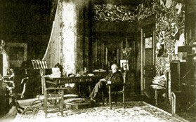 Pierre Paris posando en su despacho de la Casa Velázquez de Madrid, el epicentro de los hispanistas franceses en España durante todo el siglo XX.